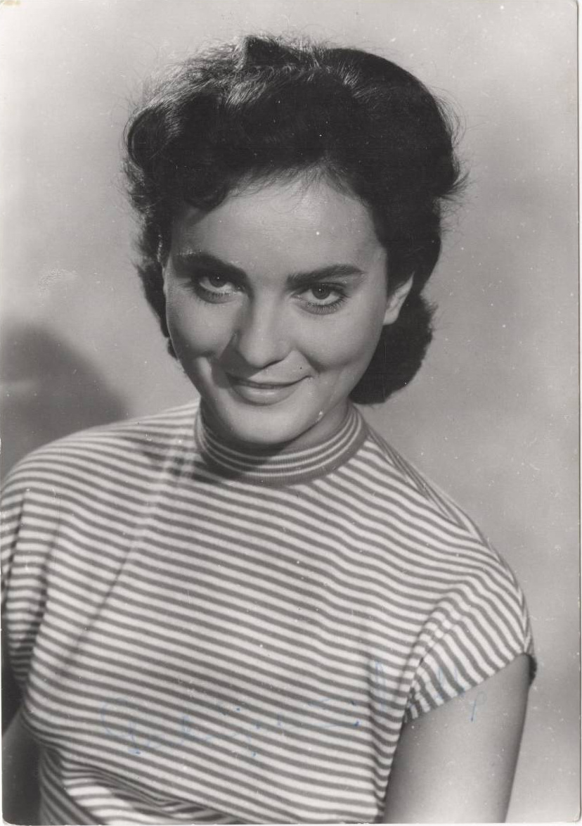 Razglednica Metke Gabrijelčič.